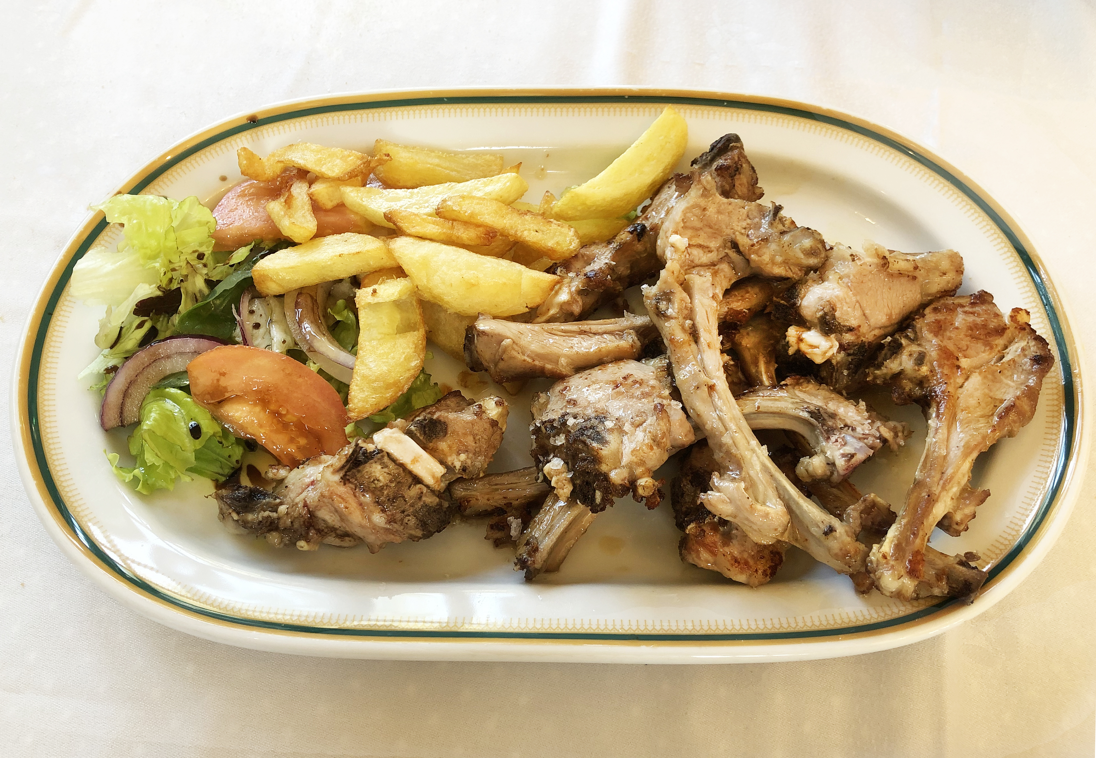 Chuletilles de corderu Llechal Burgos